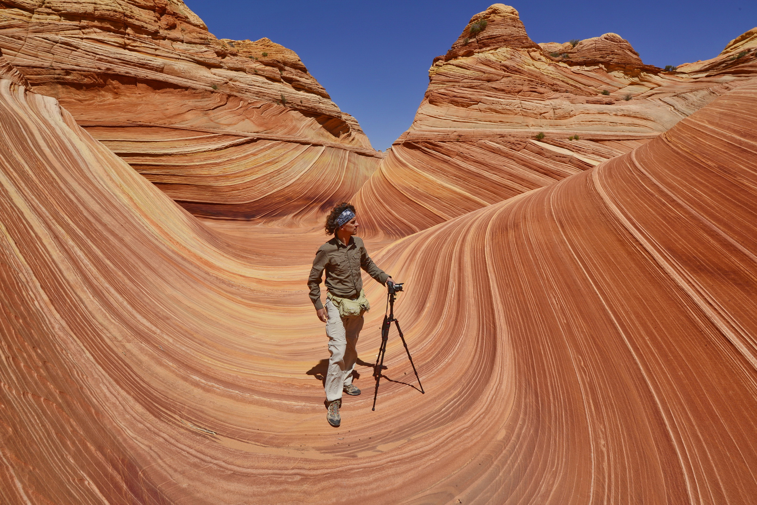 Foto di Luca Bracali